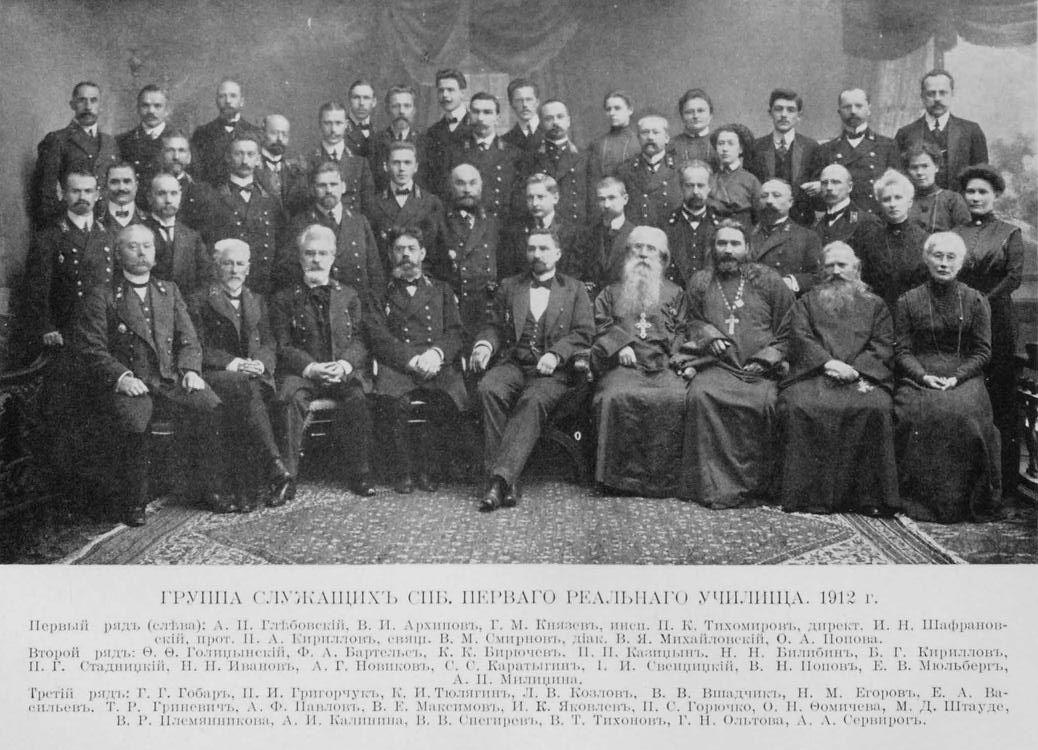 Служащие Первого Санкт-Петербургского реального училища (1903)